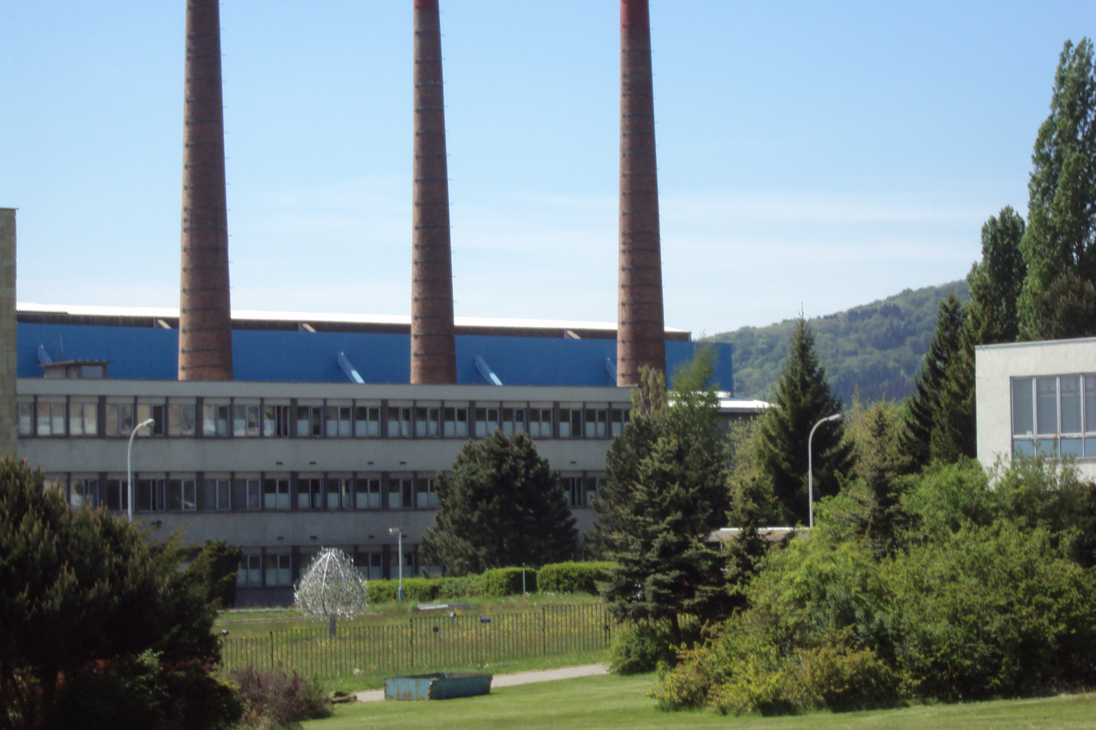 Sklárna Crystalex v Novém Boru